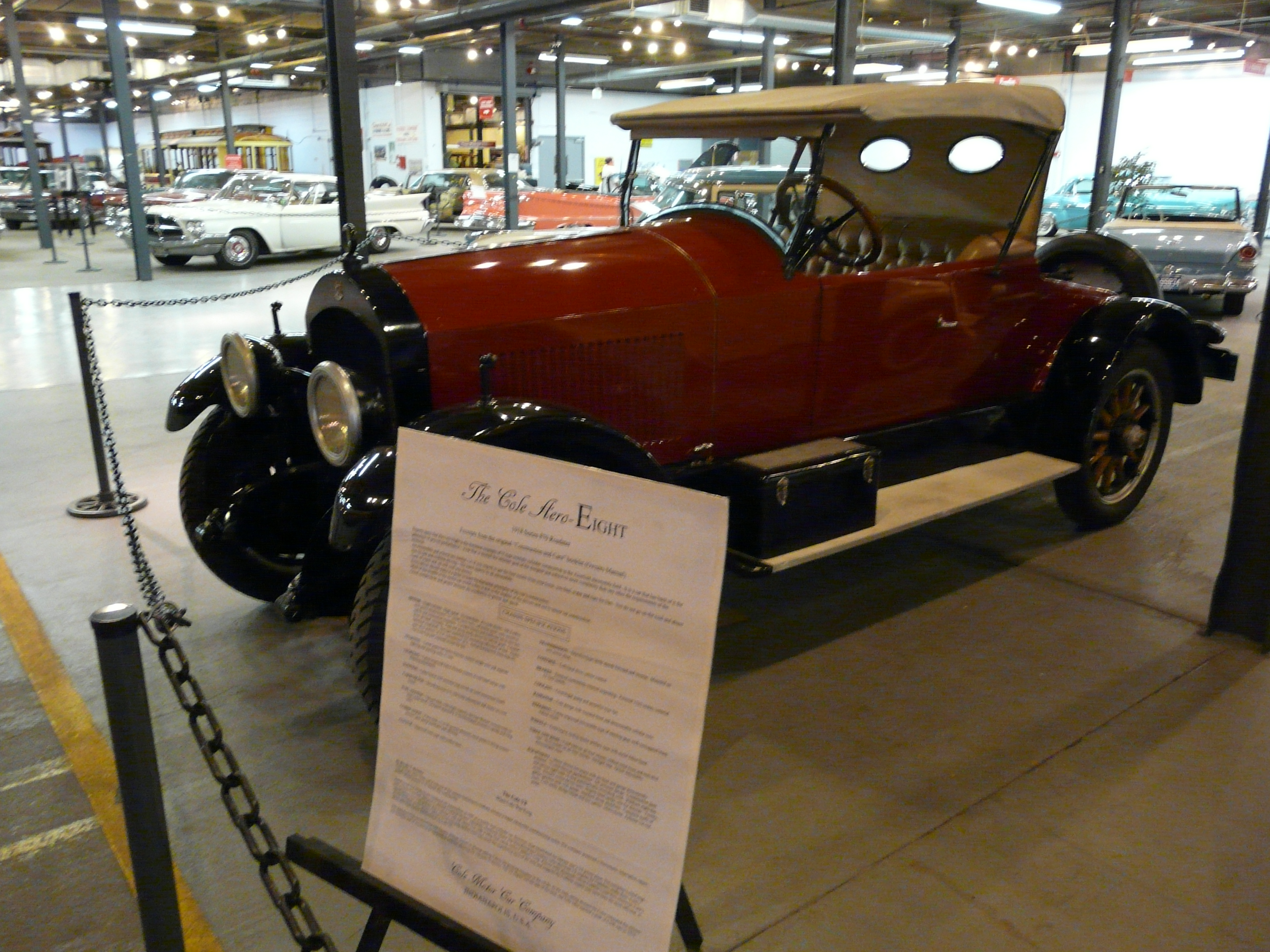 Denver, summer 2012